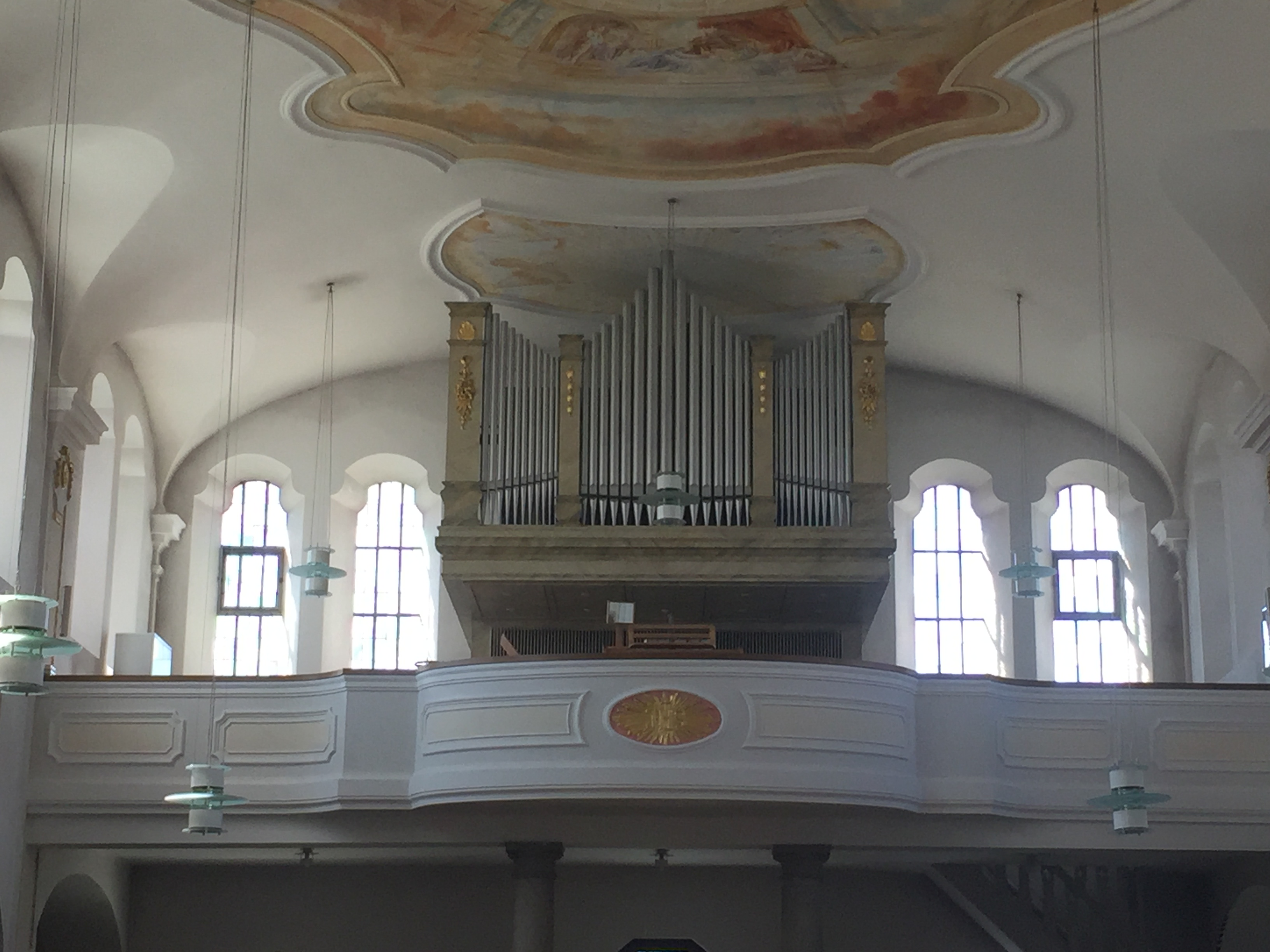 Die Orgel